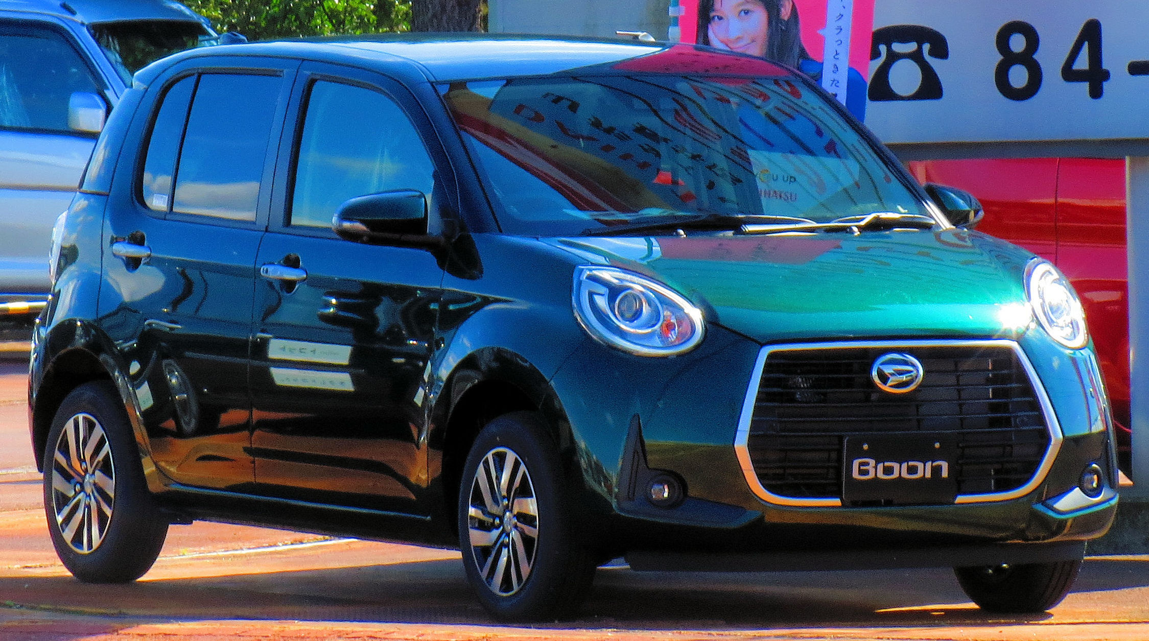 ダイハツ・ブーン シルク“G パッケージ SA Ⅲ” 2018年10月登場型